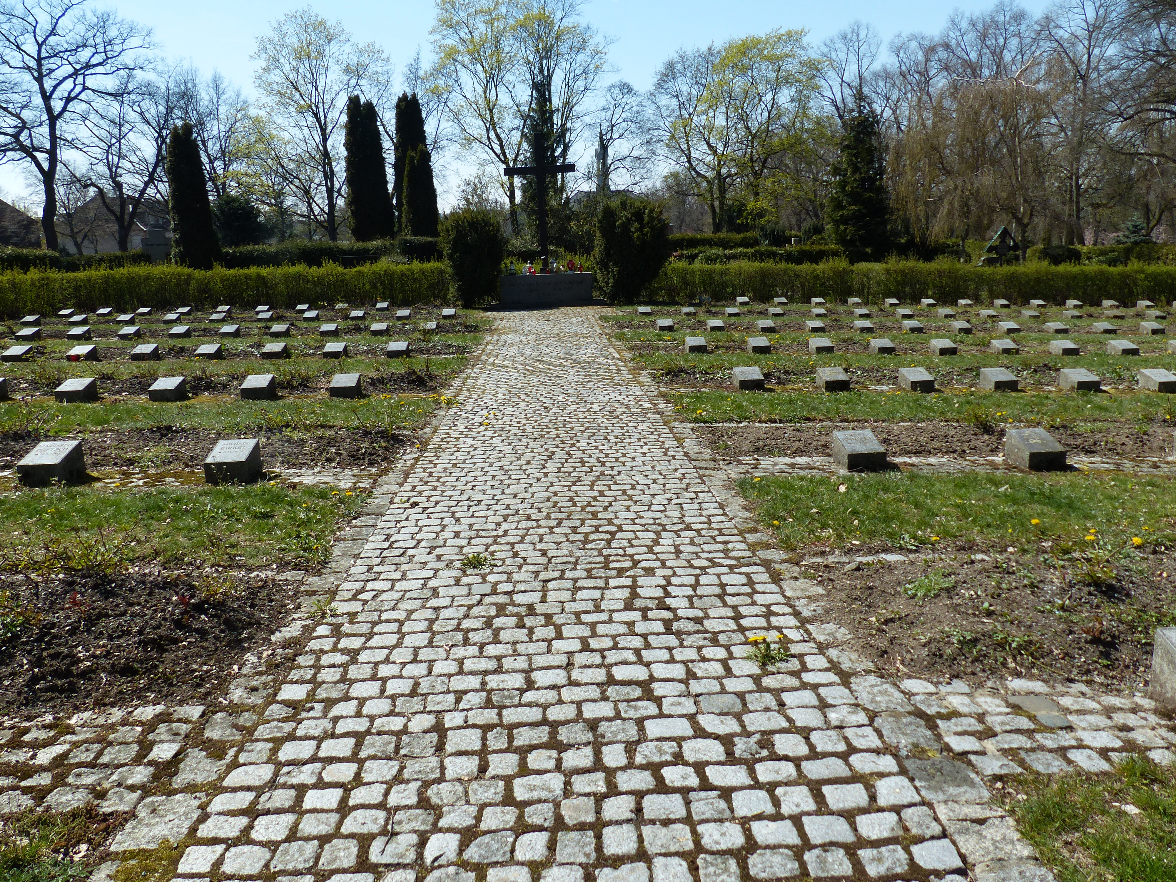 Kriegsgräberfriedhof Hof: Gräberfeld für Tote der Luftangriffe vom April 1945